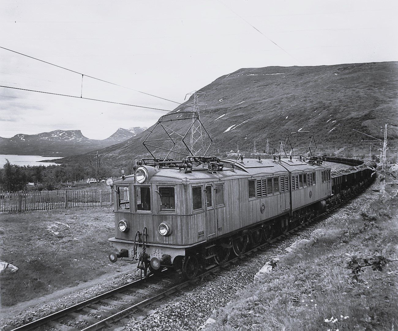 DIG92898 Elektriskt drivet malmtåg. I bakgrunden Torneträsk och Lapporten. Den främre lokhalvan är Of 94. Electric cargotrain for trasporting of ore. Near the Torneträsk in Sweden. The first locomotive is class Of number 94. Photo: Okänd/ Unknown